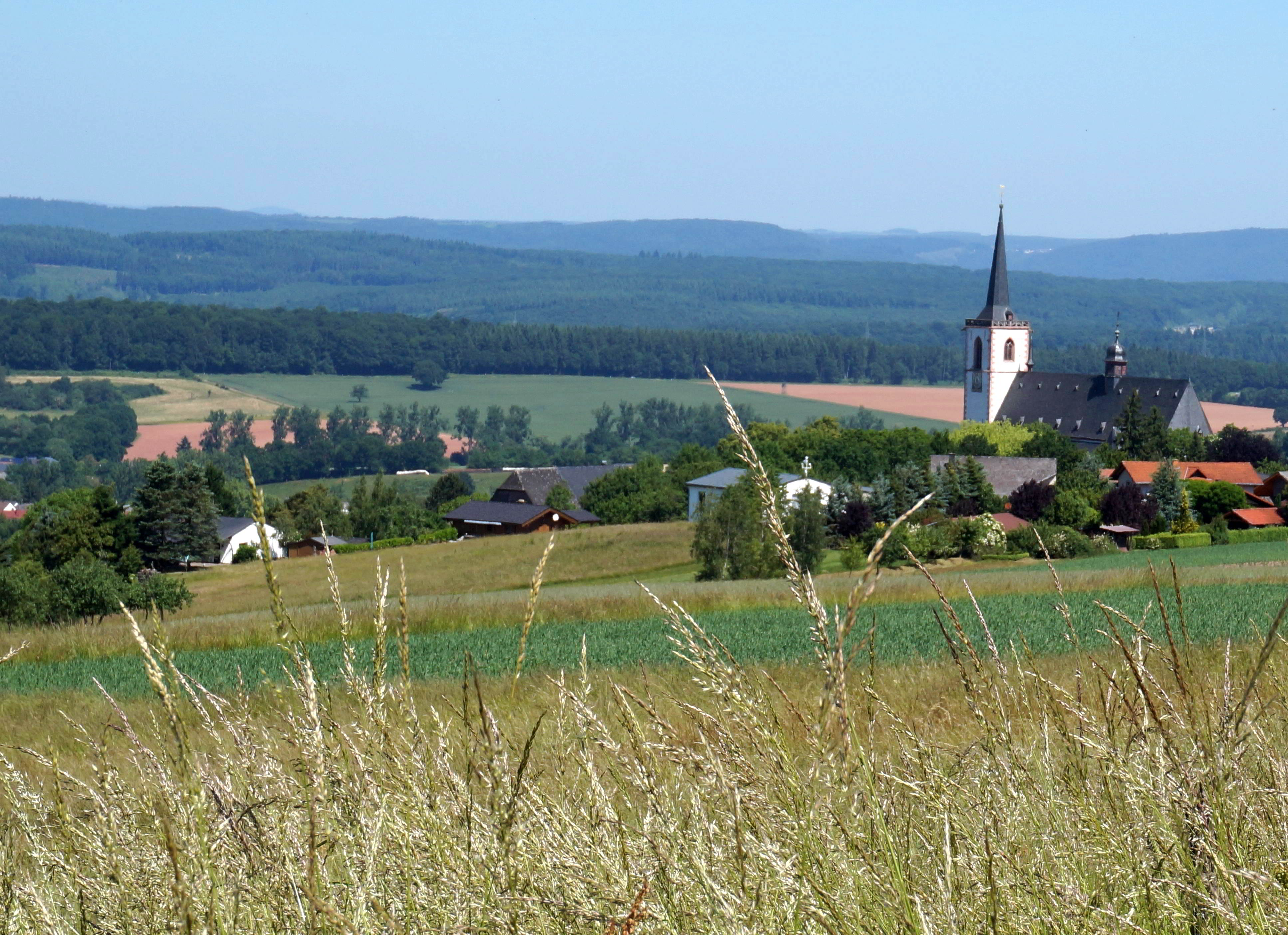 Klausen (Kreis Bernkastel-Wittlich)